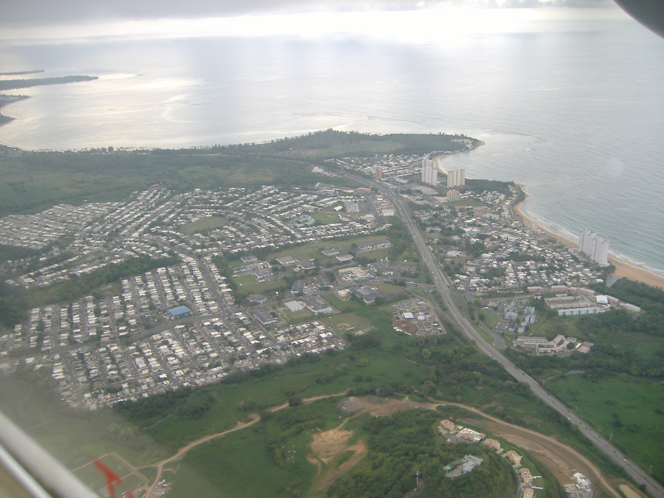 Aerial view of Luquillo, Puerto Rico.